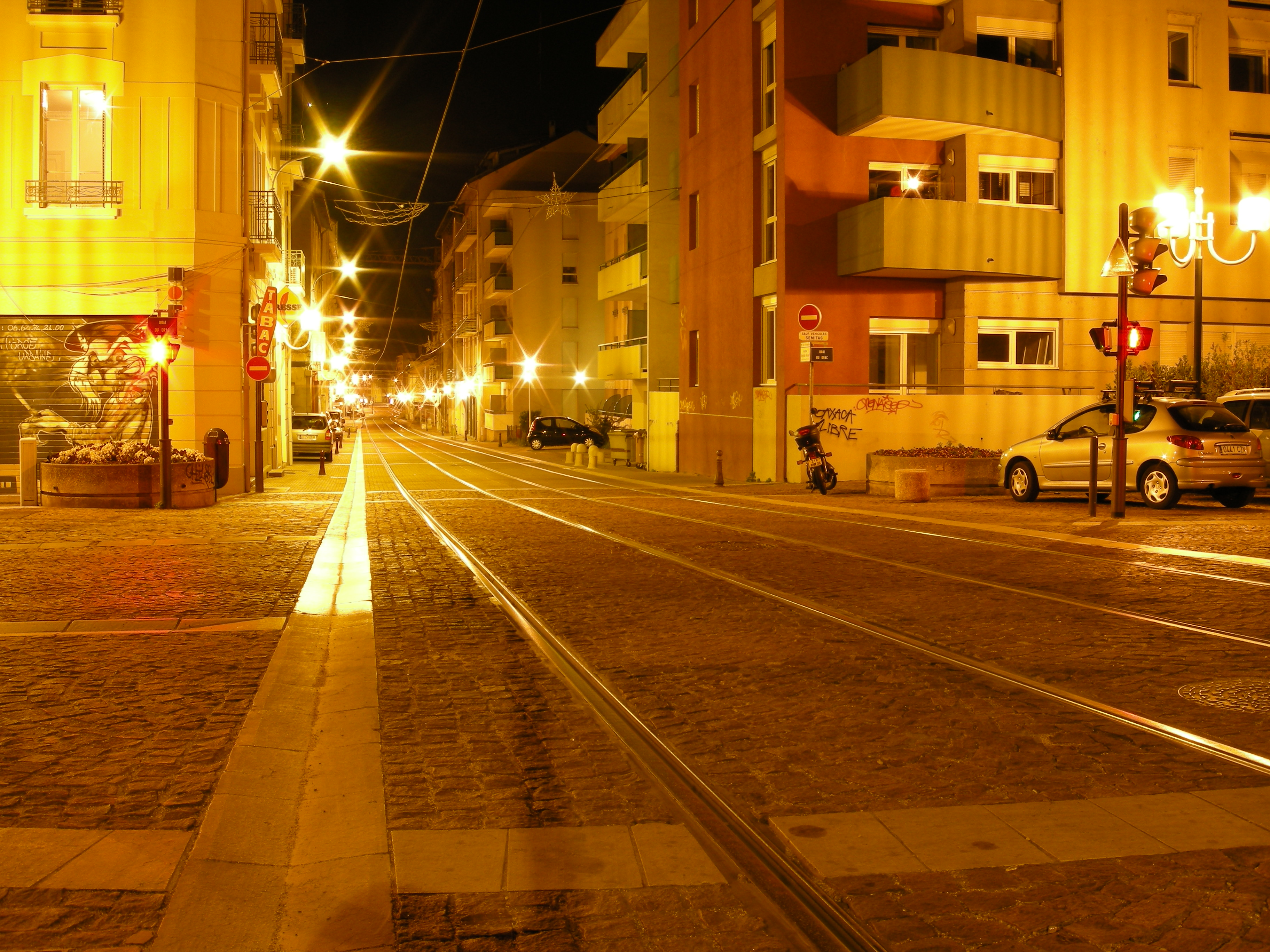 Avenue Aristide Briand depuis le Quai du Drac, Fontaine (38), France